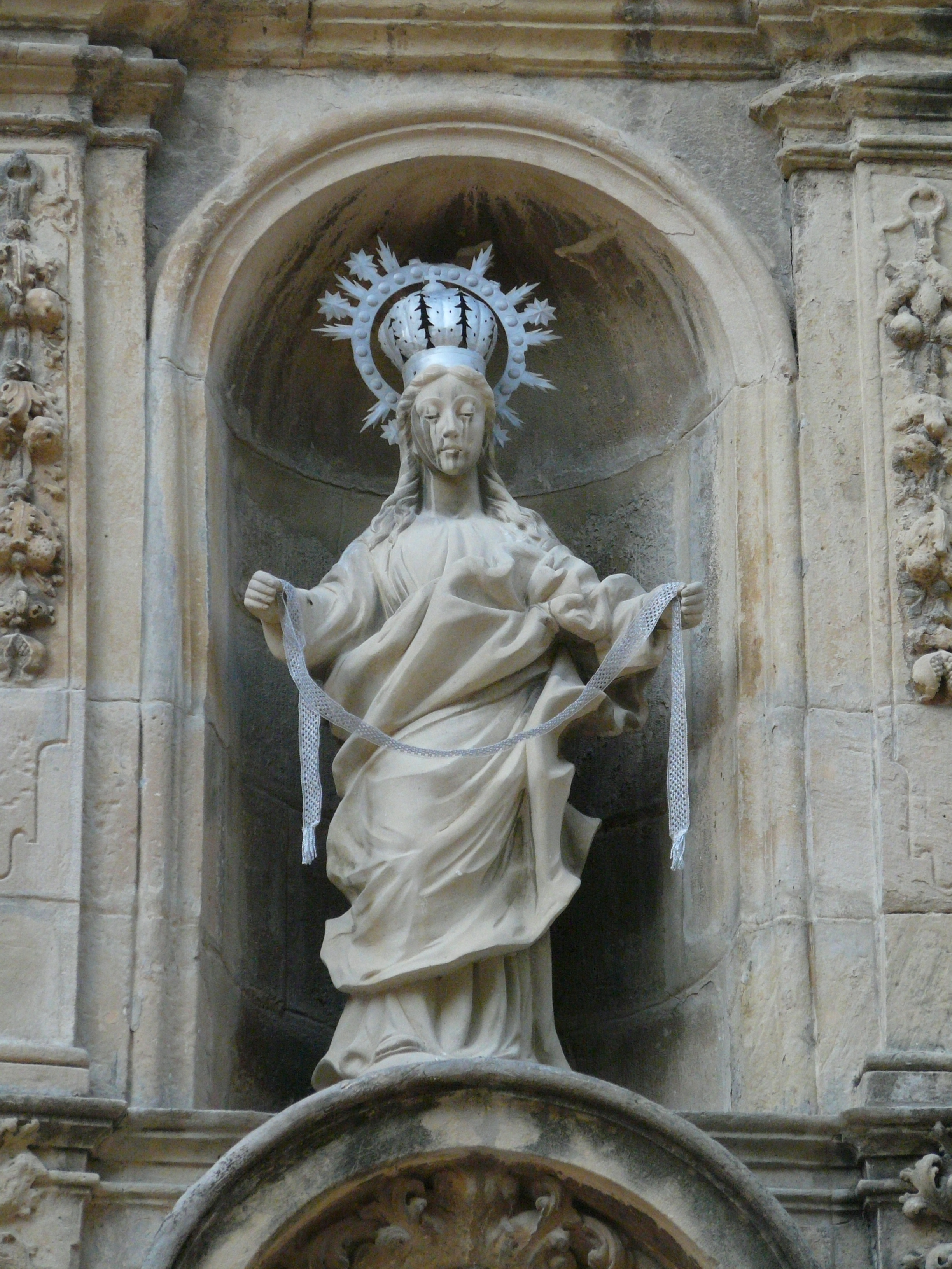 Catedral de Santa Maria (Tortosa) Object location40° 48′ 51.52″ N, 0° 31′ 21.4″ E